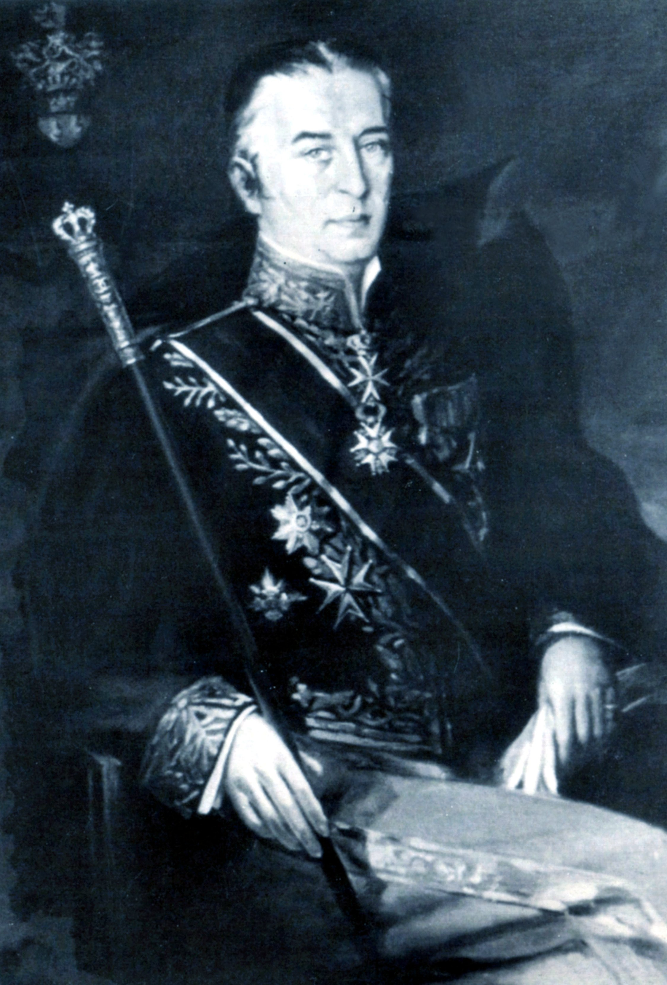 Constantin Ritter von Flondor als Marschall des königlich rumänischen Hofes 1937